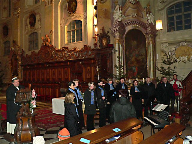 Nová Říše 2008